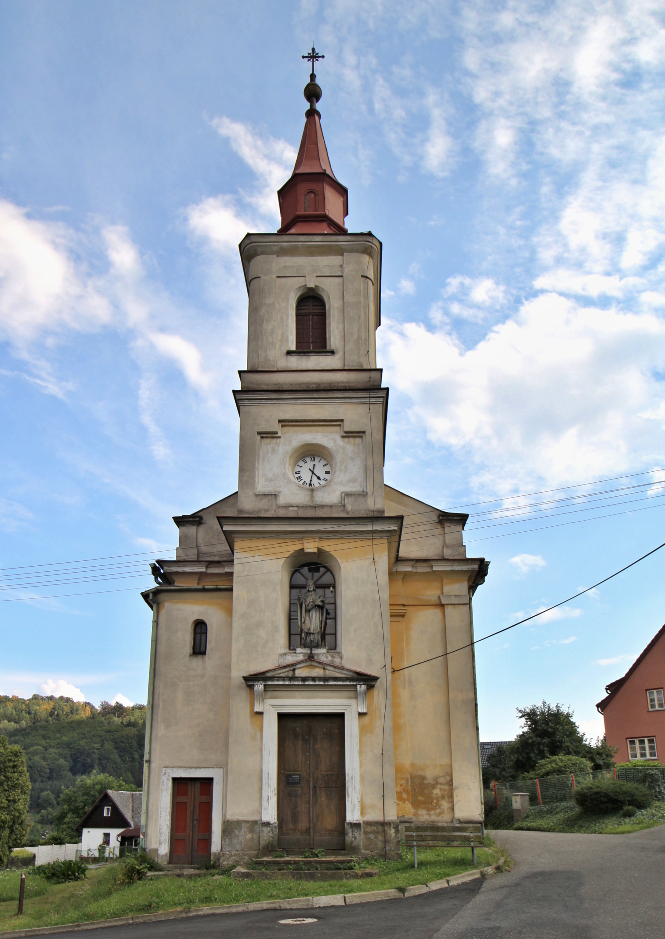 Chrastava - Andělská Hora, kostel Panny Marie Sněžné